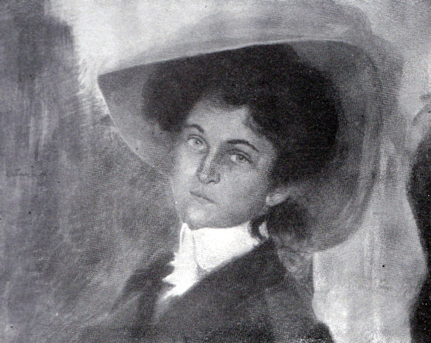 Portretul Luciei Mantu